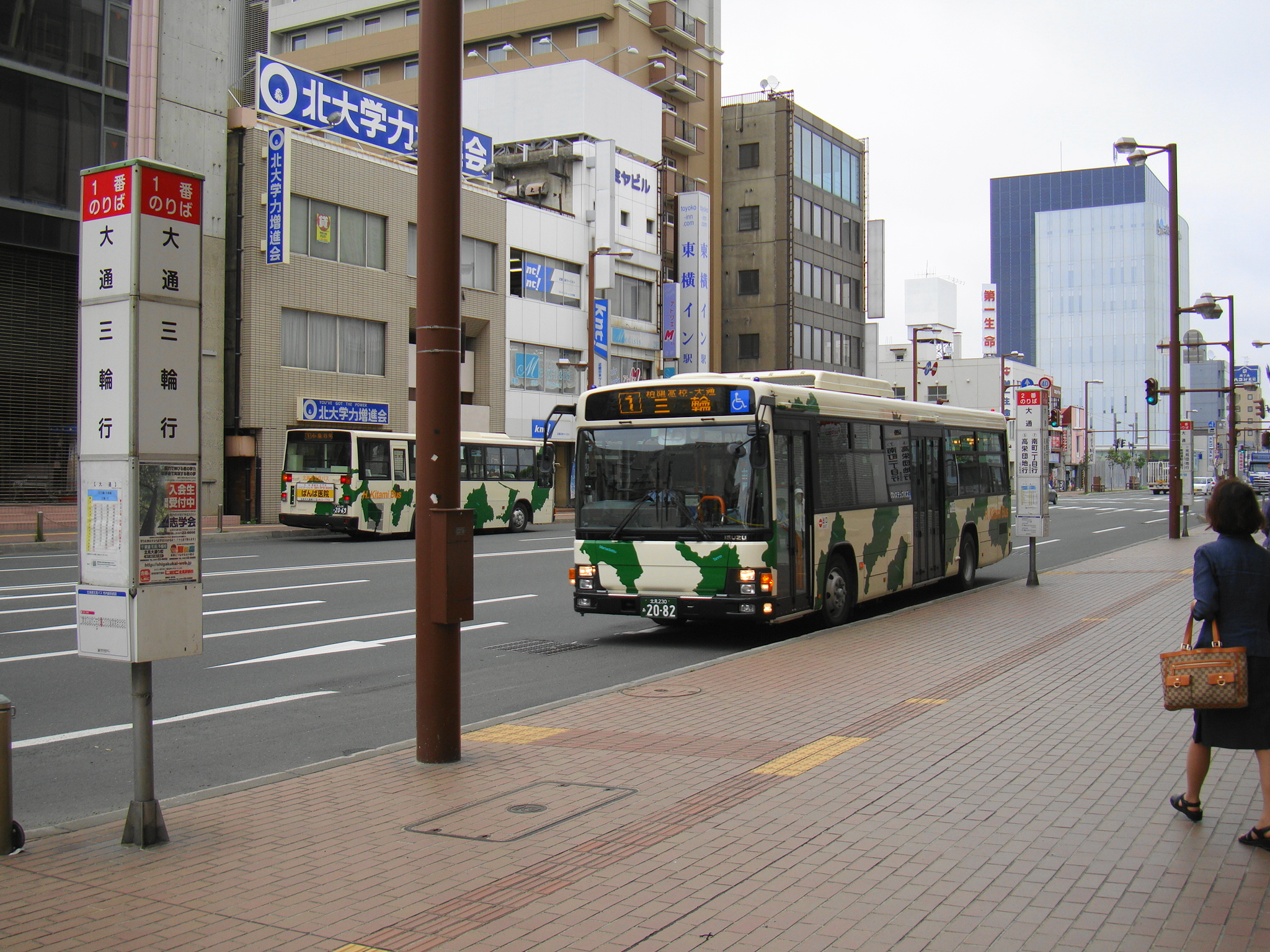 Kitami Bus Terminal "Ōdōri" Bus stop